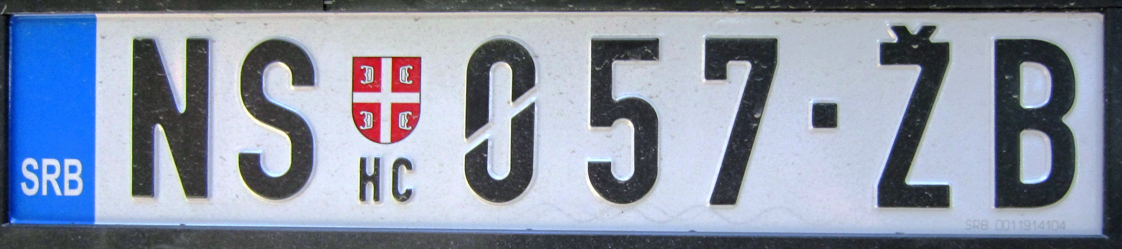 kentekenplaat Servië nieuw